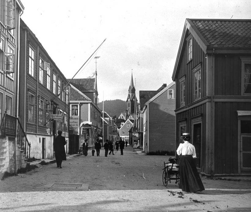 Lluís Llagostera i Pascual